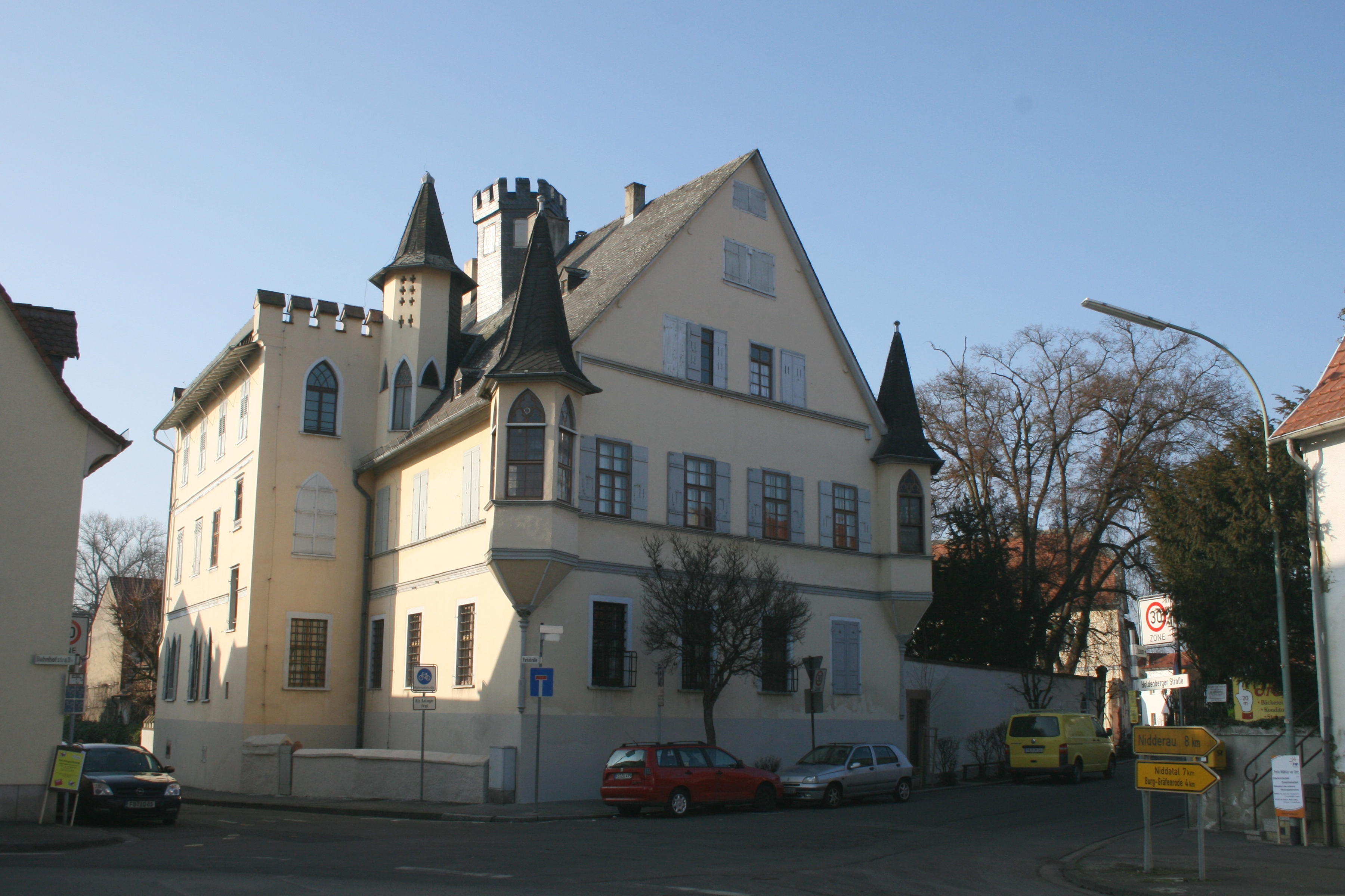 Leonhardisches Schloss in Groß-Karben, Wetteraukreis. Ansicht des Herrenhauses von der Straßenseite.